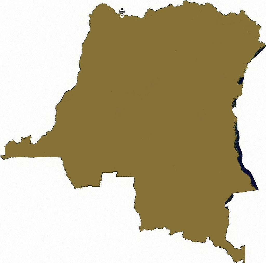 kaart congo